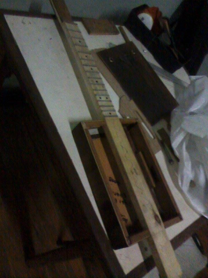 Interior de una Cigar Box Guitar.